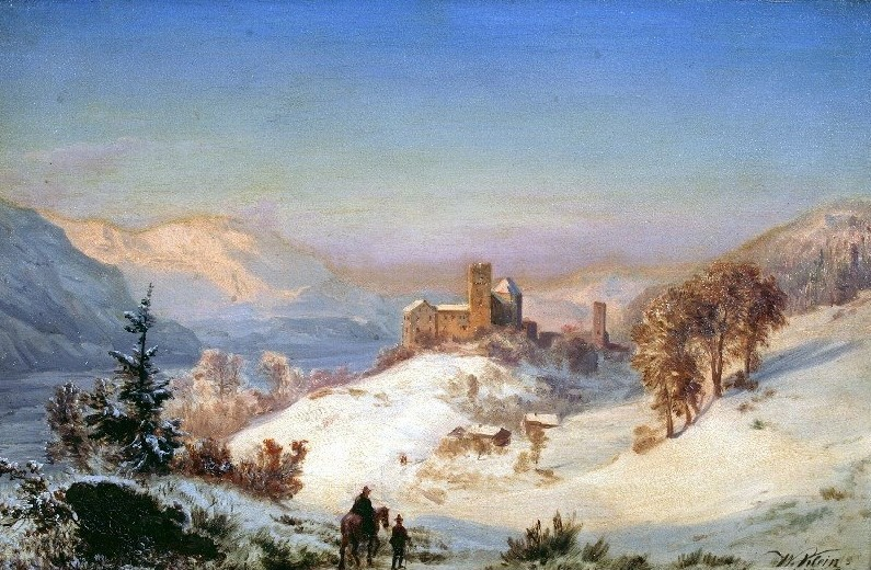 Schloss Kropfsberg, 24cm*37,5cm